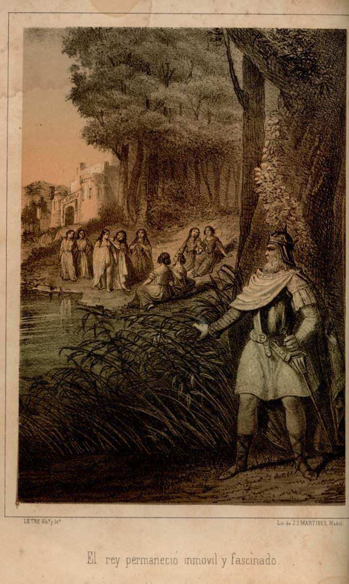 El rey permaneció inmóvil y fascinado.